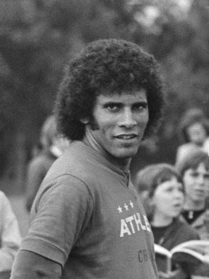 WK 74, training Brazilie; Valdomiro Vaz Franco